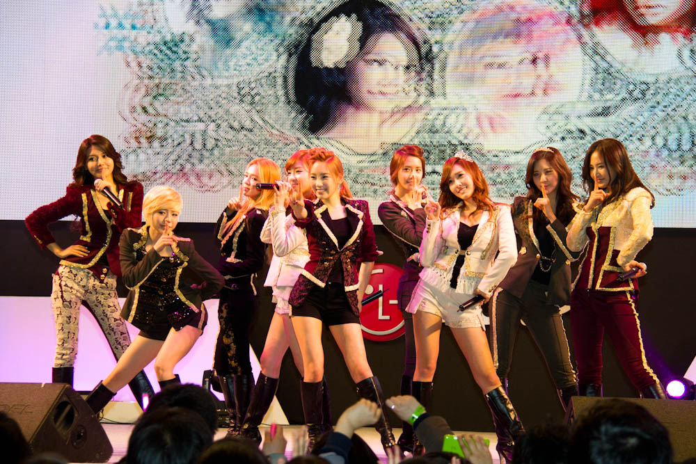 Lg전자가 3월 31일, 4월 1일 양일간 서울 잠실동 롯데월드 아이스링크에서 'lg 시네마3d 월드페스티벌'을 성황리에 개최했다. ※ LG전자 뉴스룸 에서 관련 보도자료를 확인실 수 있습니다.